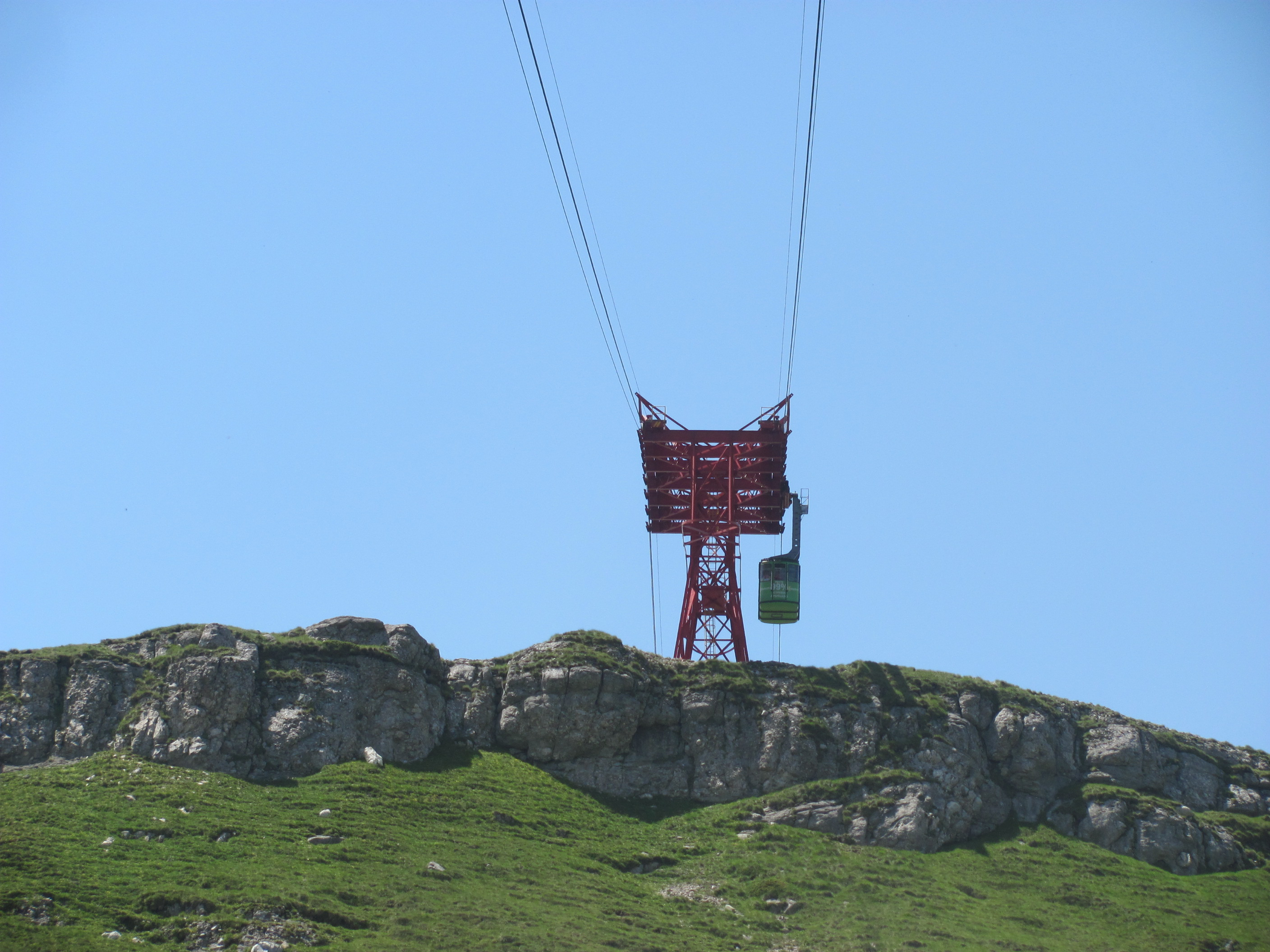 Telecabina Busteni-Babele la Stalpul 5-Iulie 2011